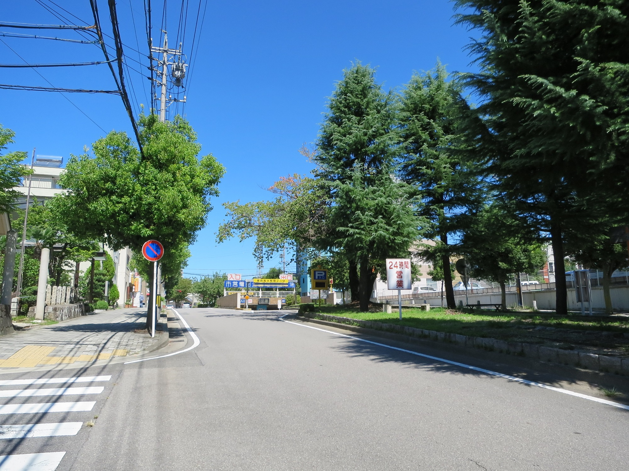 西岸前の中央緑道（岡崎市康生通南）